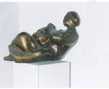 מנגנת, ברונזה.